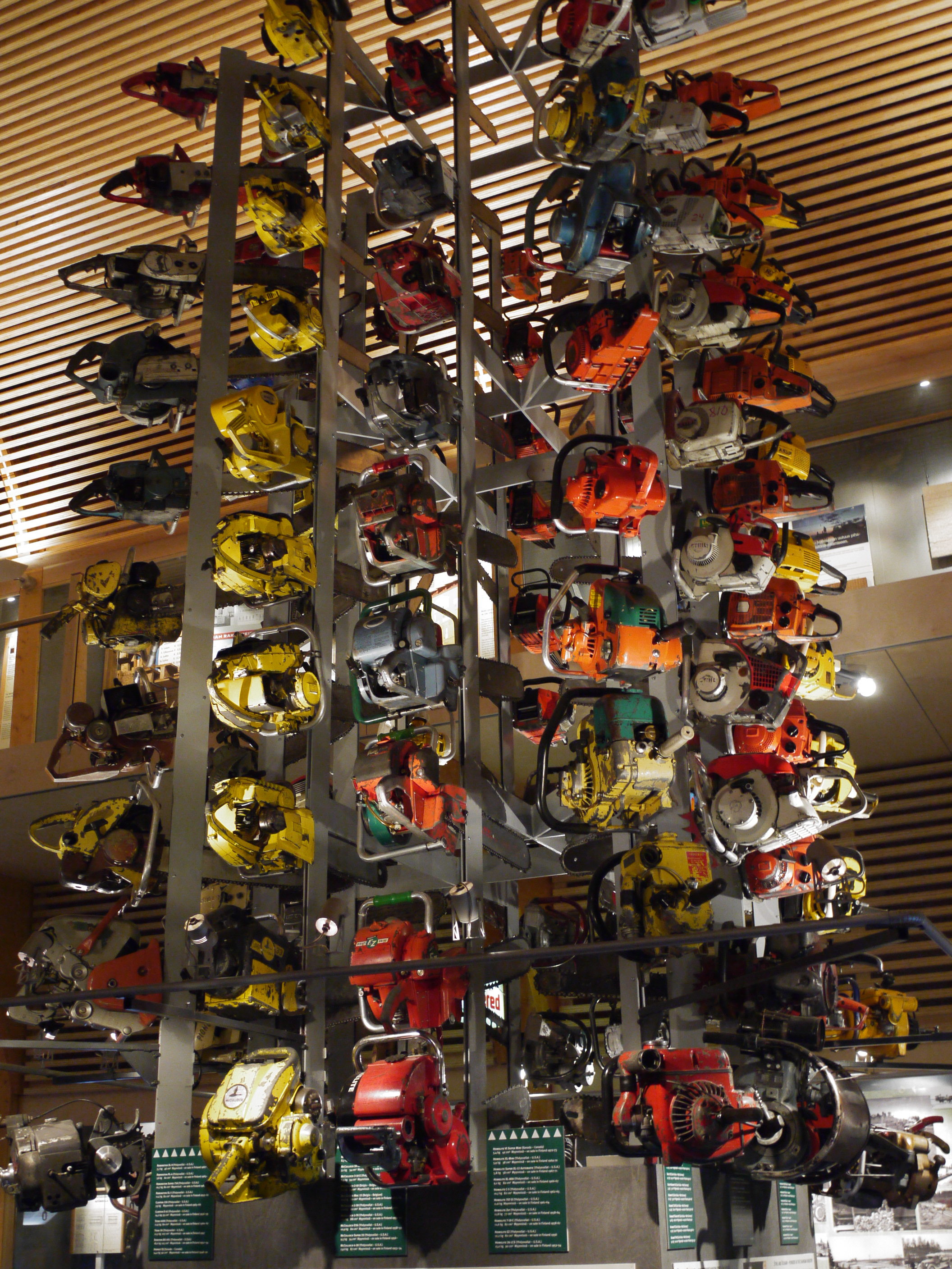 finnische Museum und Wissenschaftszentrum für Waldkultur LUSTO, Sammlung unterschiedlicher Motorsägen